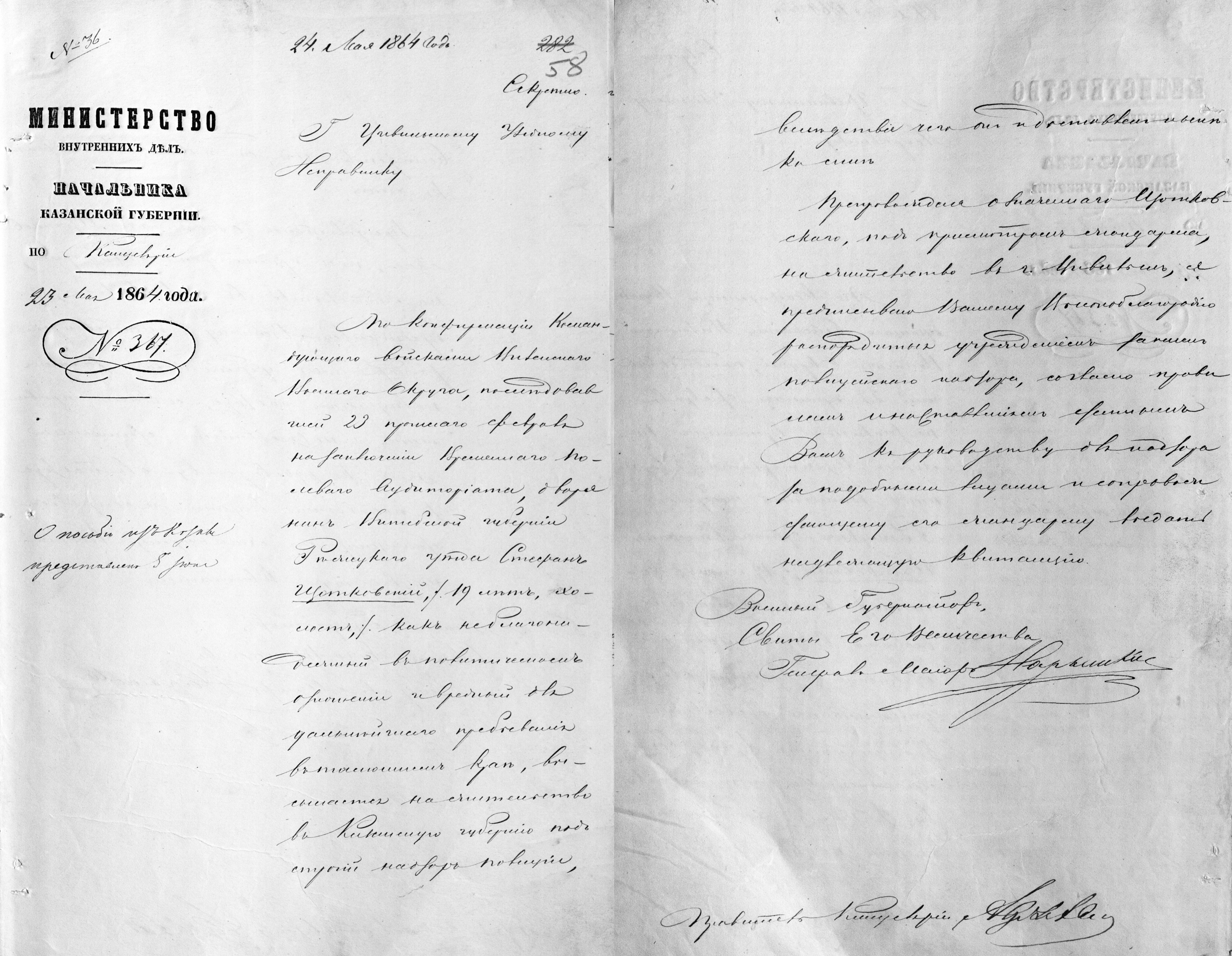 decyzja o zesłaniu Stefana Szczotkowskiego (ojca Zygmunta) "za nieprawomyślność polityczną" po powstaniu styczniowym do Ciwilska w guberni kazańskiej По конфирмации Командующего войсками Витебского военного округа, последовавшей 23 прошлого февраля нач... Кр..го военного аудитората дворянин Витебской губернии Режицкого уезда Стефан Щотковский /19 лет, холост/ как неблагонадёжный в политическом отношении и вредный от дальнейшего пребывания в тамошнем краю , высылается на жительство в Казанскую (?) губернию под строгий надзор полиции вследствие чего был доставлен и …. к сим. Препровождается означенного Щотковского под присмотром жандарма на жительство в городе Цивильске с представлением Вашему Высокоблагородию (...??...) полицейского надзора, согласно права (...???...) Ваш к руководству от надзора (...??...) сопровождающему его жандарму выдать (..?..) квитанцию. Военный Губернатор Свиты Его Величества Генерал-майор